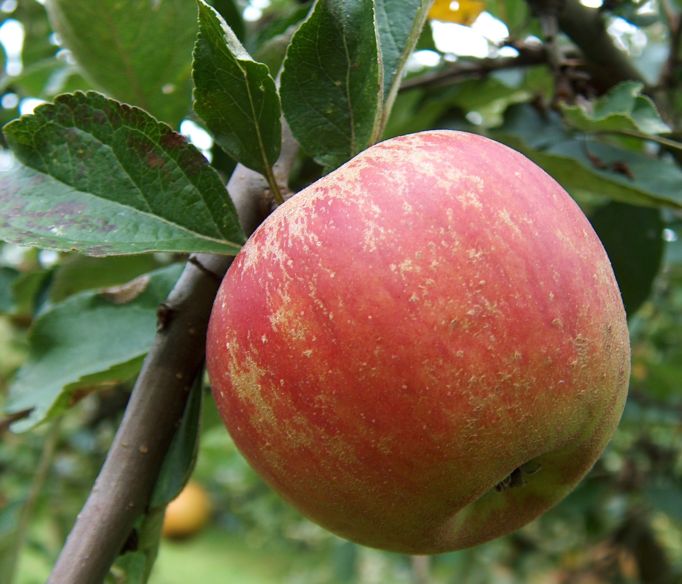 Ein Apfel der Sorte Ribston Pepping am Baum